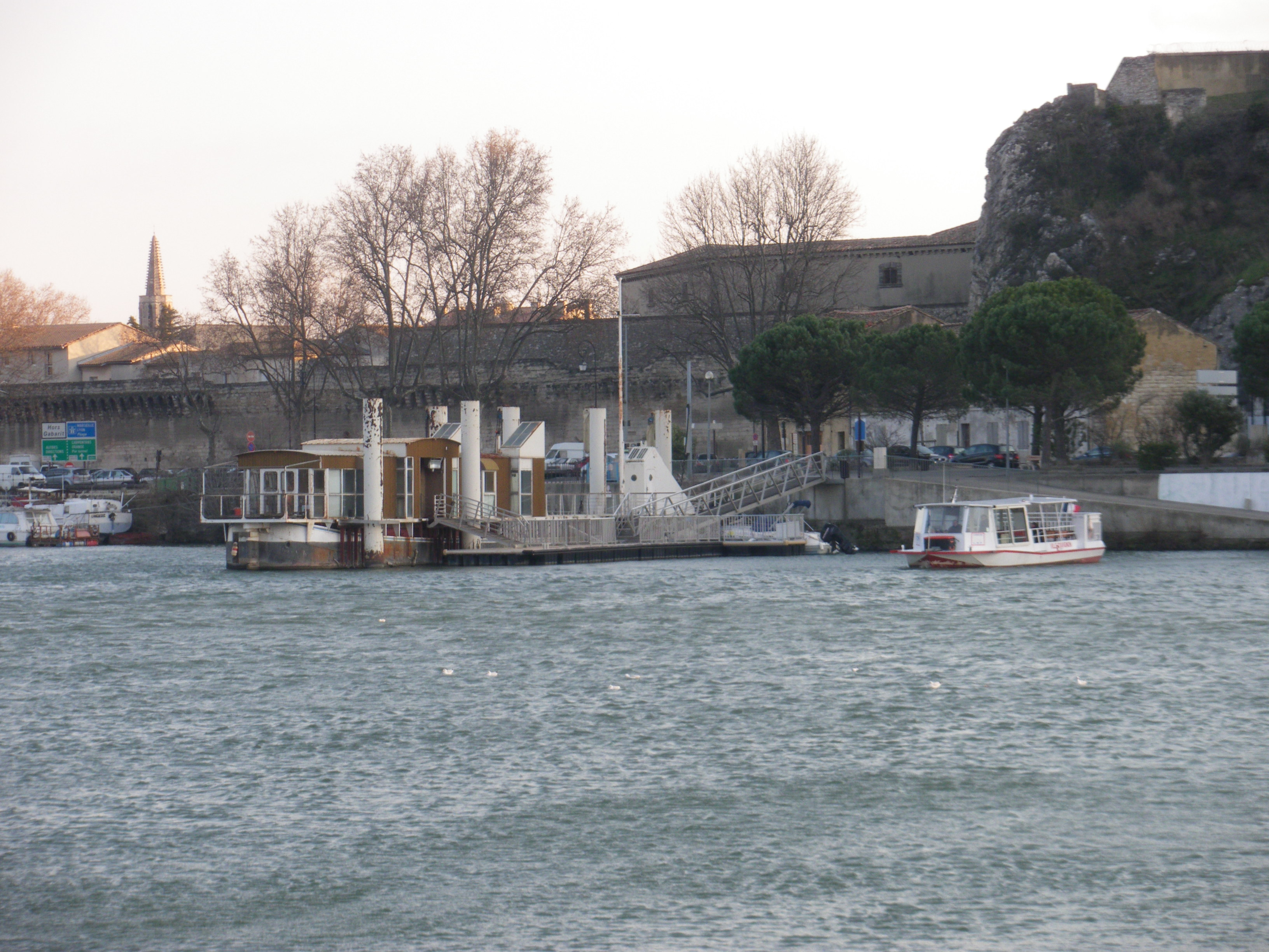 Capitainerie et base de la navette fluviale, à Avignon. Cette navette gratuite permet de rallier Avignon à l'île de la Barthelasse.